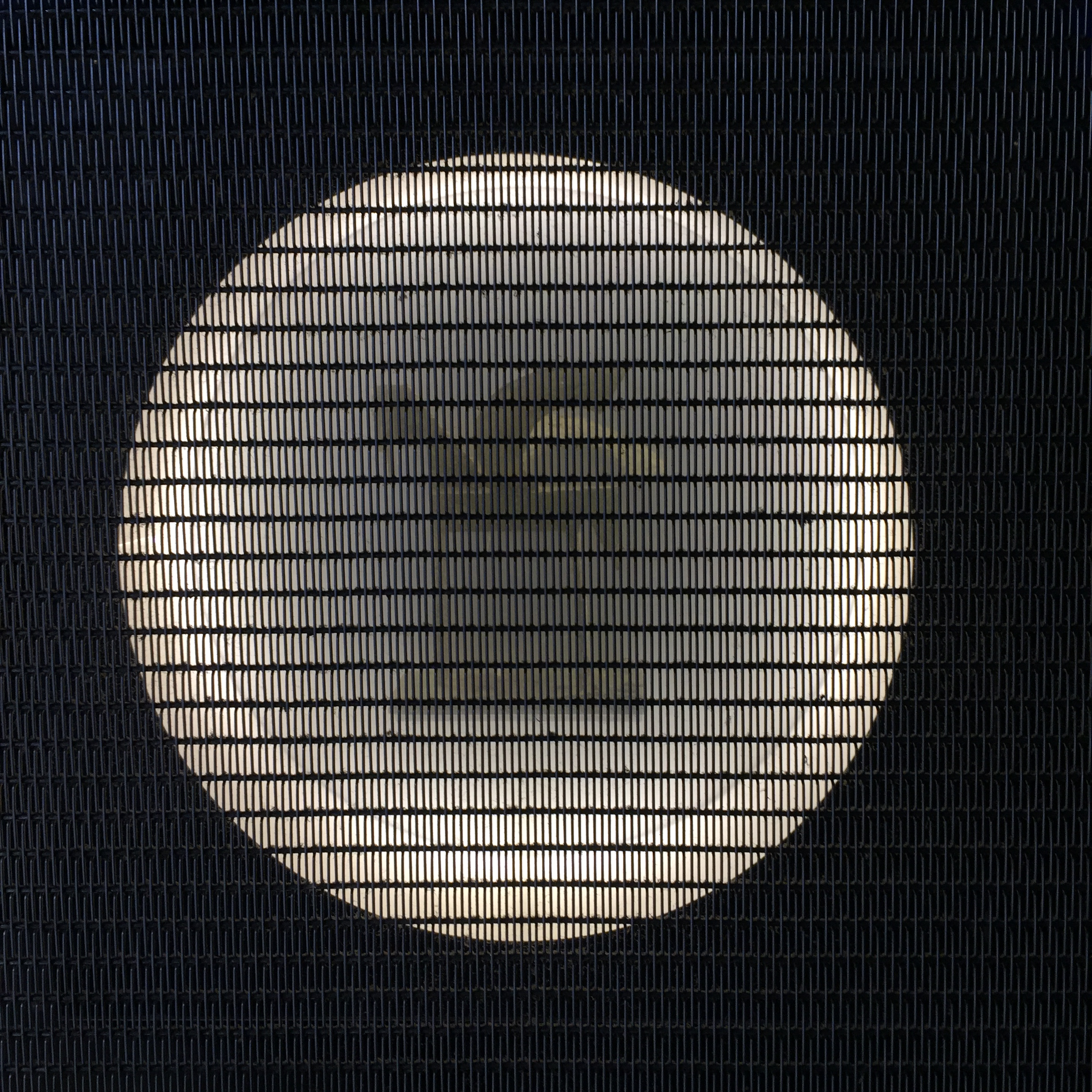 Premi ondas exposat a cadena ser BCN carrer